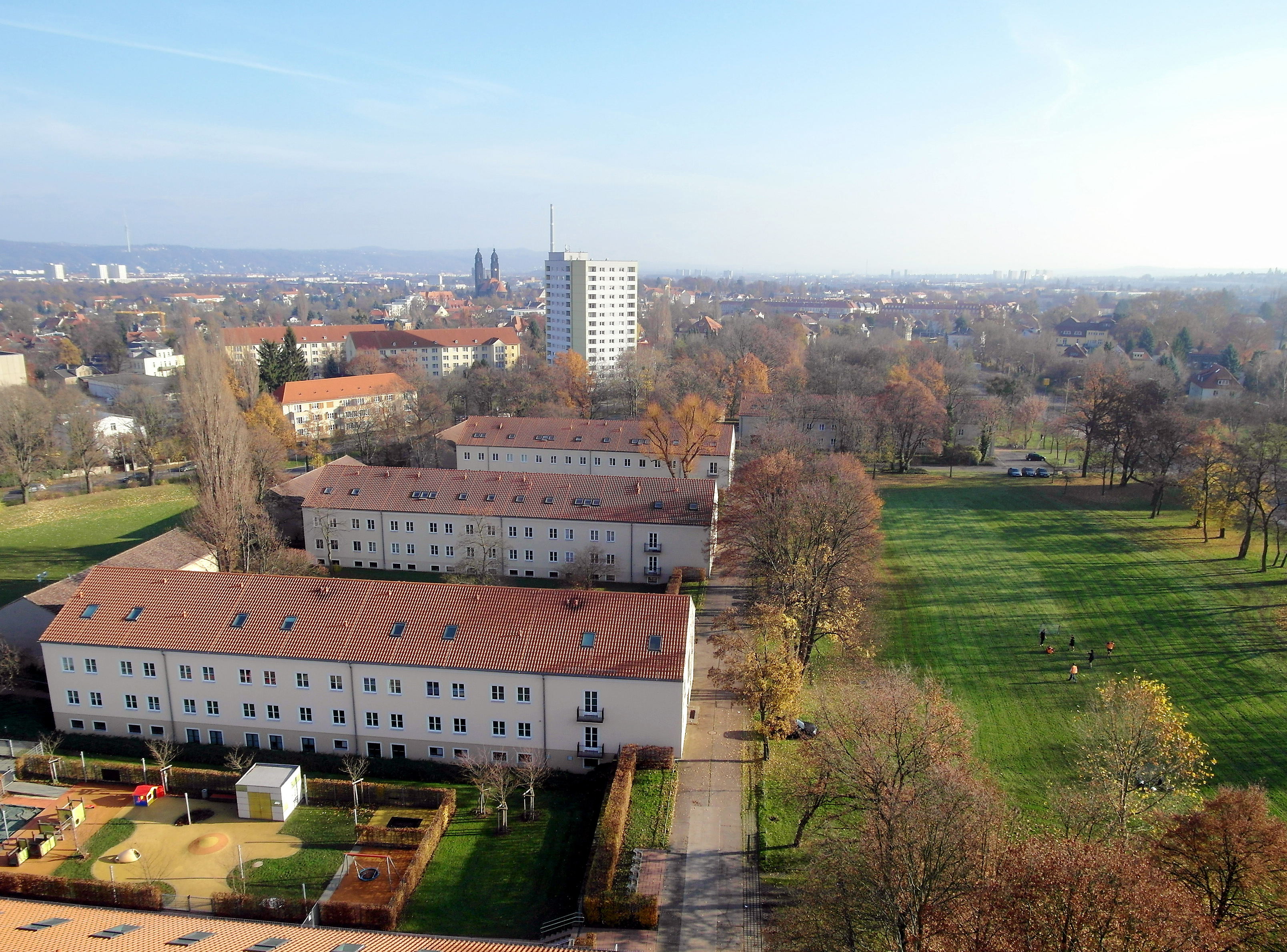 22.11.2014 01217 Dresden:Blick vom Hochhaus Wundtstraße 9 nach Südostosten. Im Vordergrund die Wohnheime der einstigen Arbeiter- u. Bauern Fakultät, Zellescher Weg 41a-d (GMP: 51.028645,13.750911). Dahinter V.l.n.r.: 3-Geschosser mit Walmdach Wohnhaus Teplitzer Str. 35/35A, Christuskirche Strehlen, Hochhaus Hildebrandstraße 7 (GMP: 51.027961,13.754394). Blick über Prohlis, Heidenau bis zu den Hochhäusern von Pirna-Sonnenstein rechts am Horizont. Rechts der Zellesche Weg. [SAM7482.JPG]20141122015DR.JPG(c)Blobelt